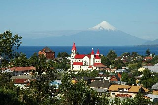 Puerto Varas mit Lago Llanquihue und dem 2652 m hohen Vulkan Osorno im Hintergrund